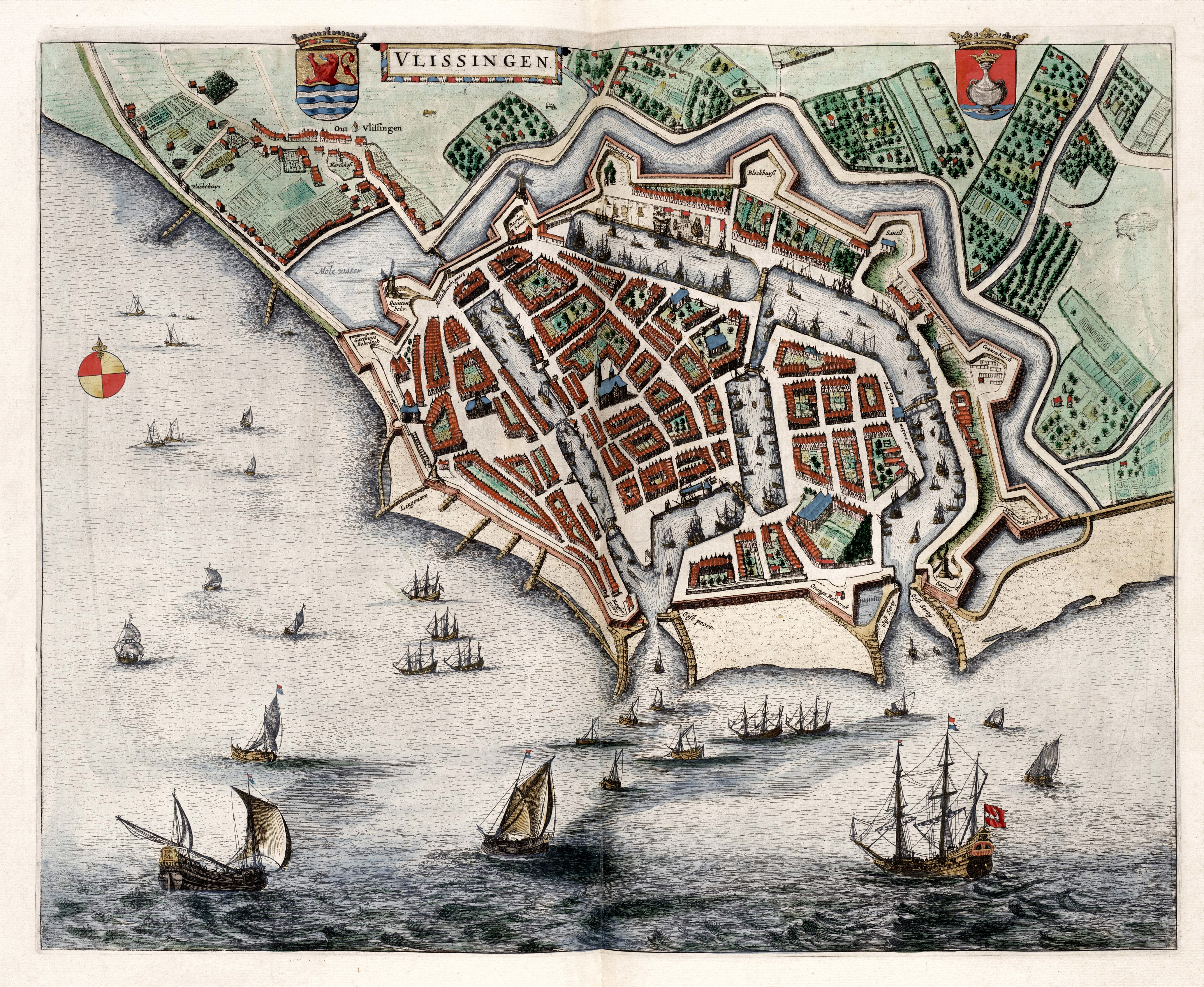 title=Vlissingen;size=40,5x51,5